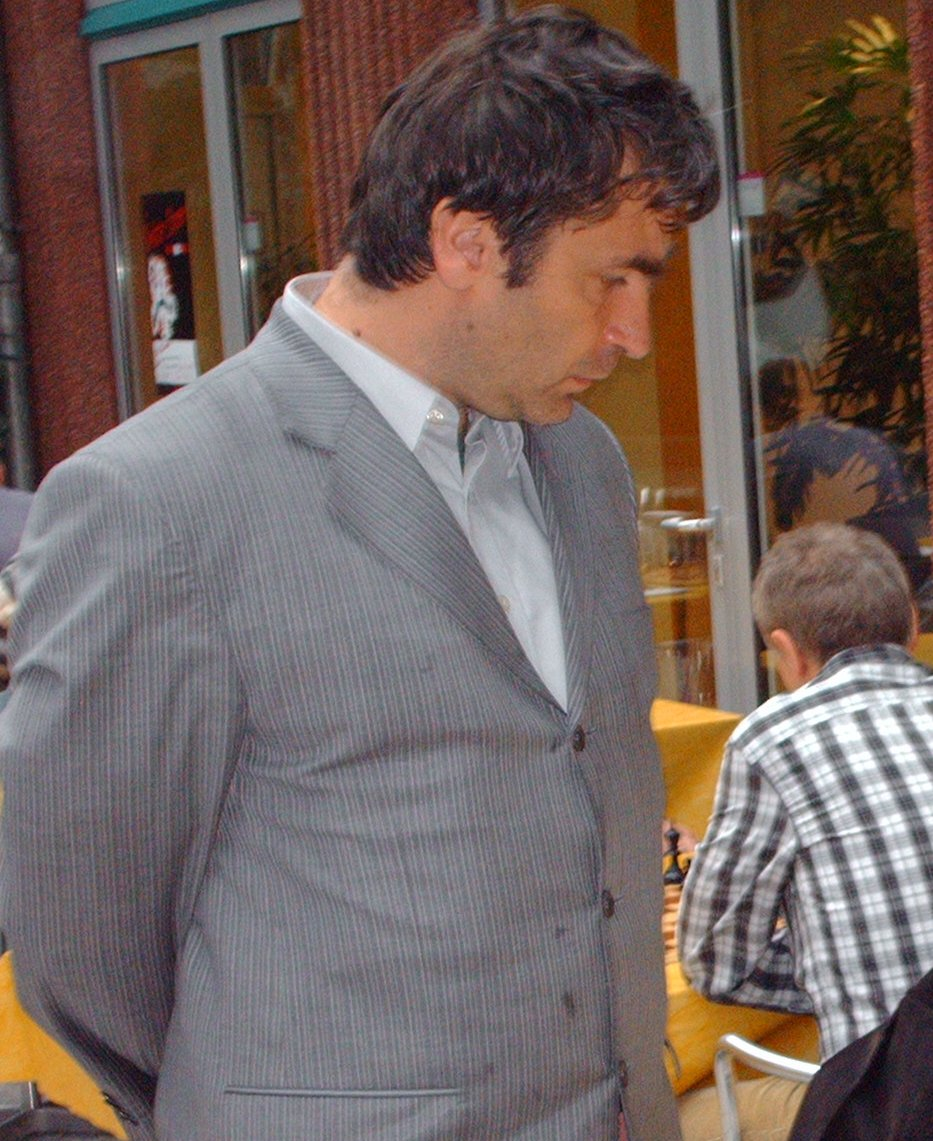 Wassili Iwantschuk am 29. Oktober 2006 bei einem Bundesliga-Wettkampf in Berlin-Tegel